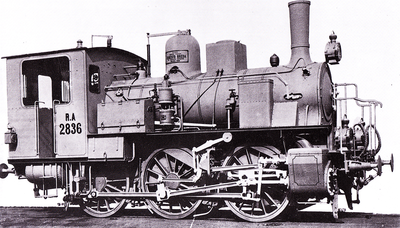 Foto di fabbrica della locomotiva a vapore n. 2836 (gruppo 280) della Rete Adriatica.